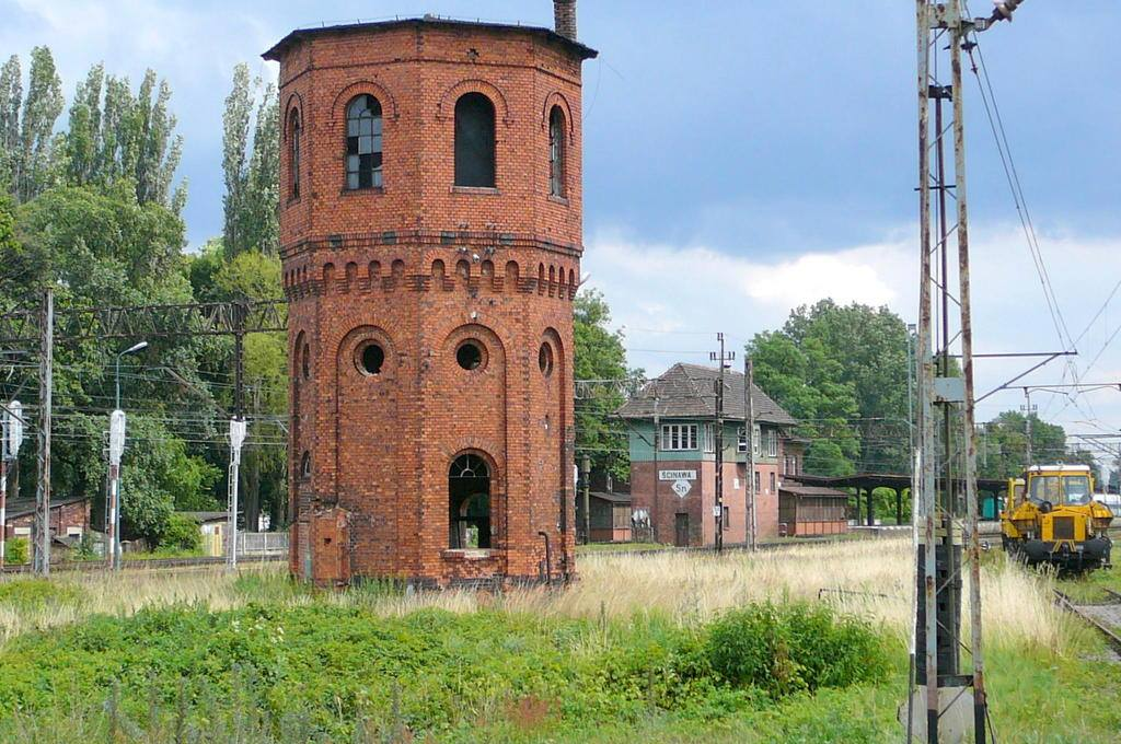 Ścinawa, wieża ciśnień, 1874-1900